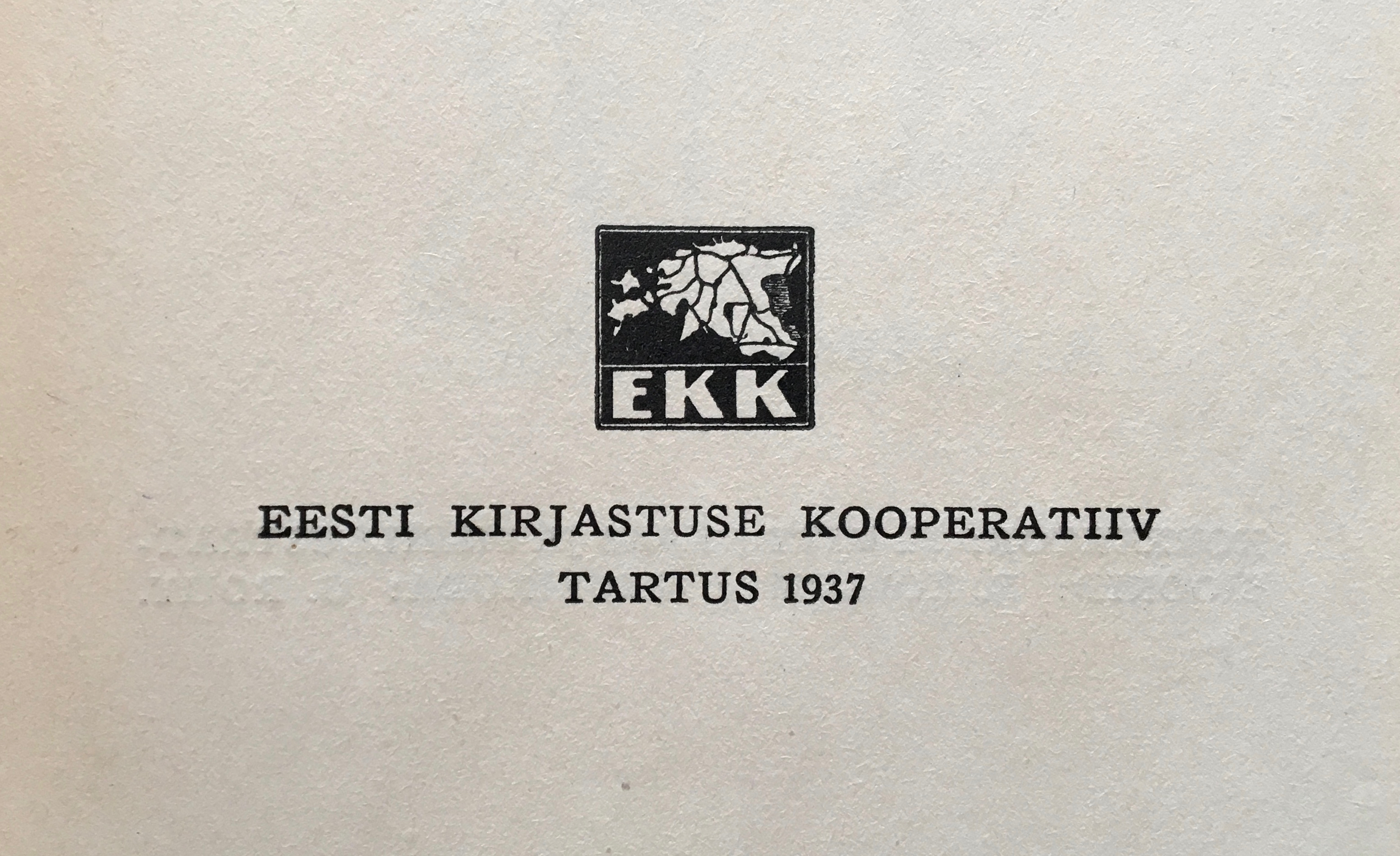 EKK embleem